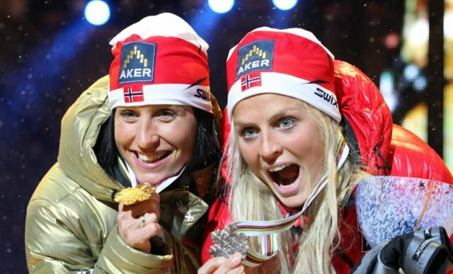 Marit Bjørgen i Therese Johaug podczas ceremonii medalowej po biegu indywidualnym kobiet na 15 kilometrów w ramach Mistrzostw Świata w Narciarstwie Klasycznym 2011 w Oslo.